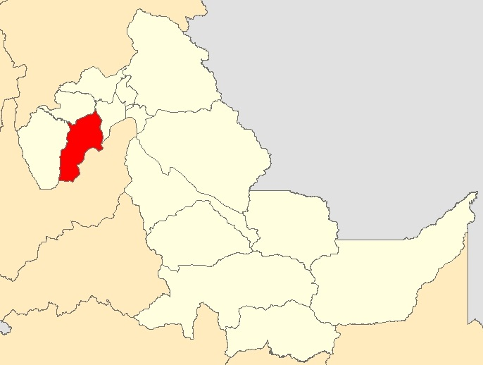 Mapa distrito Irazola, Ucayali - Perú